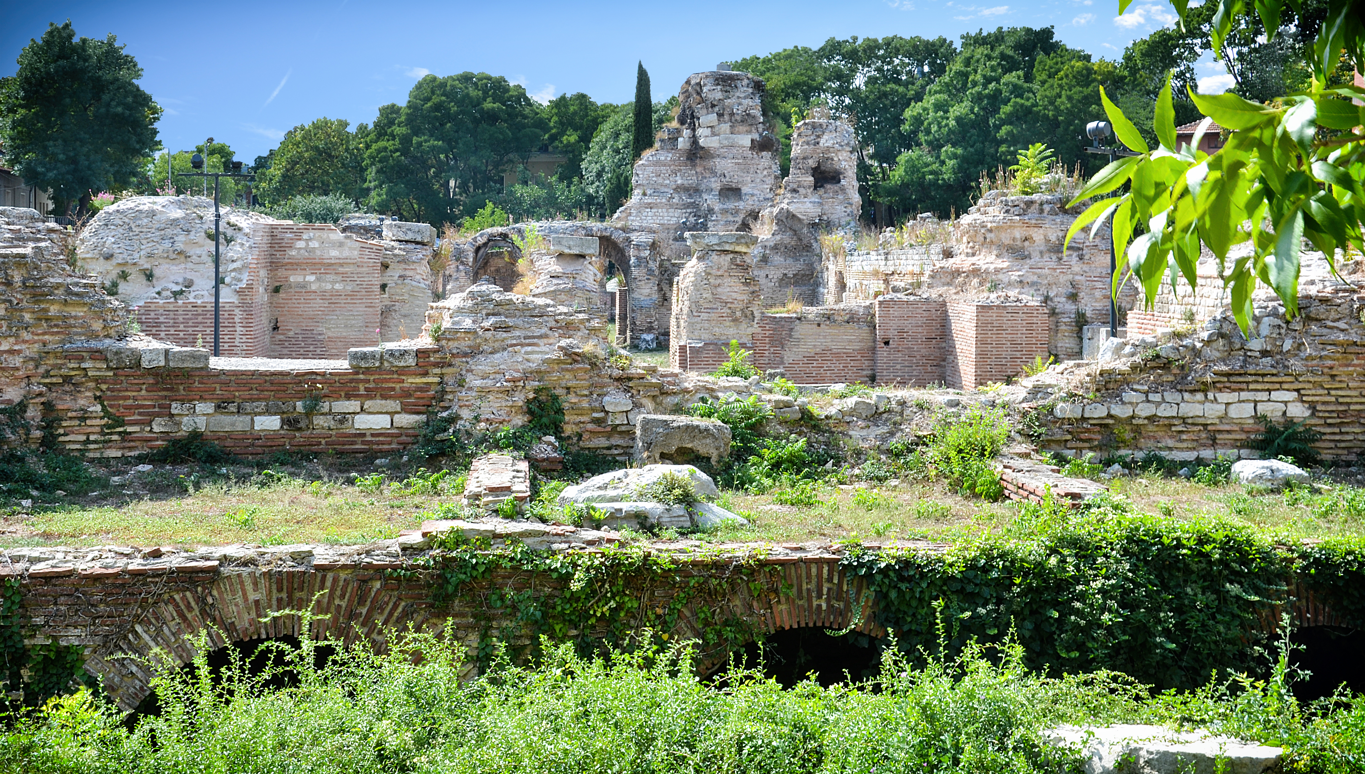 Антична сграда Римски терми